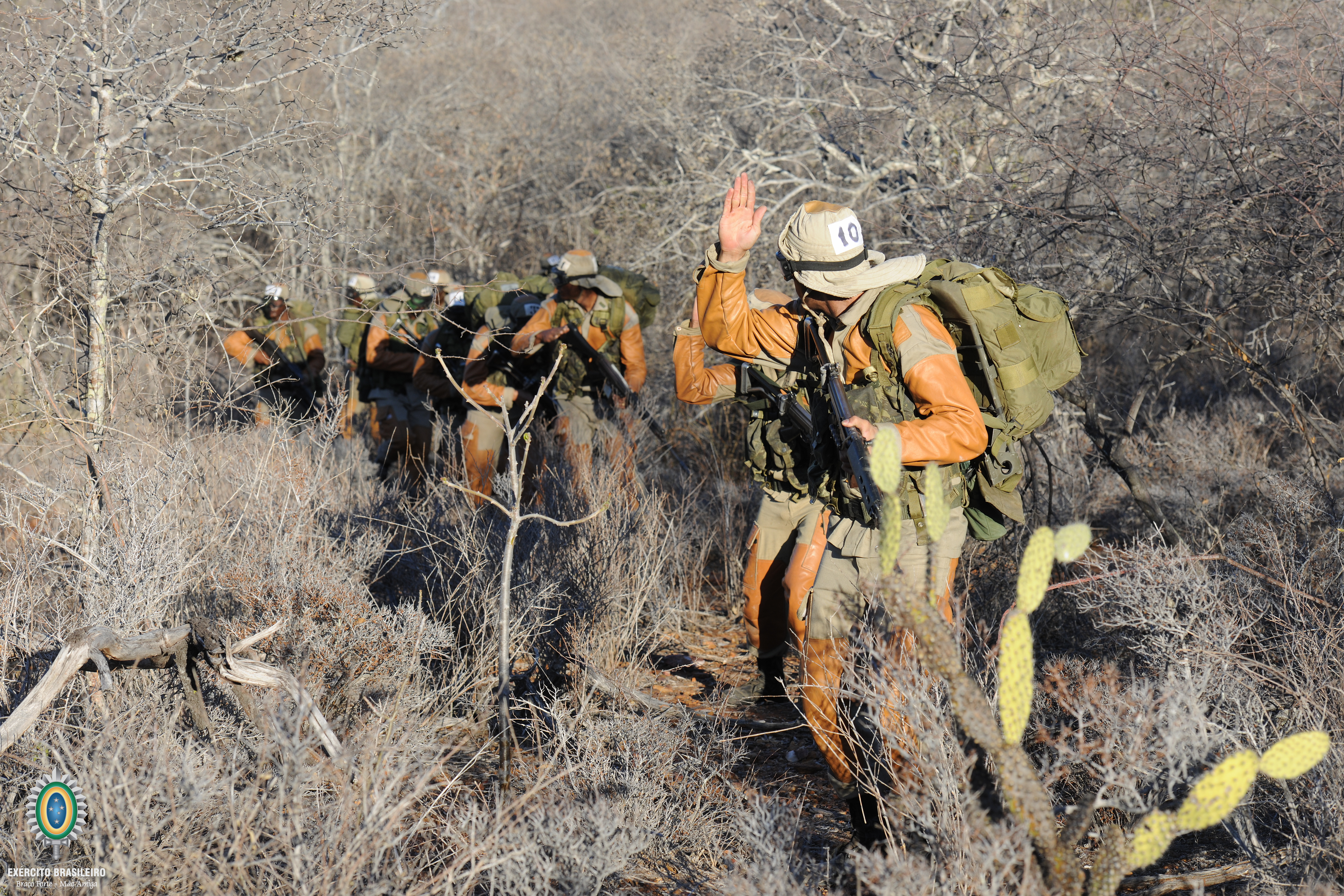 Combatente da Caatinga do 72.º Batalhão de Infantaria Motorizado - Exército Brasileiro — Petrolina, Pernambuco, Brasil